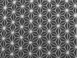 着物